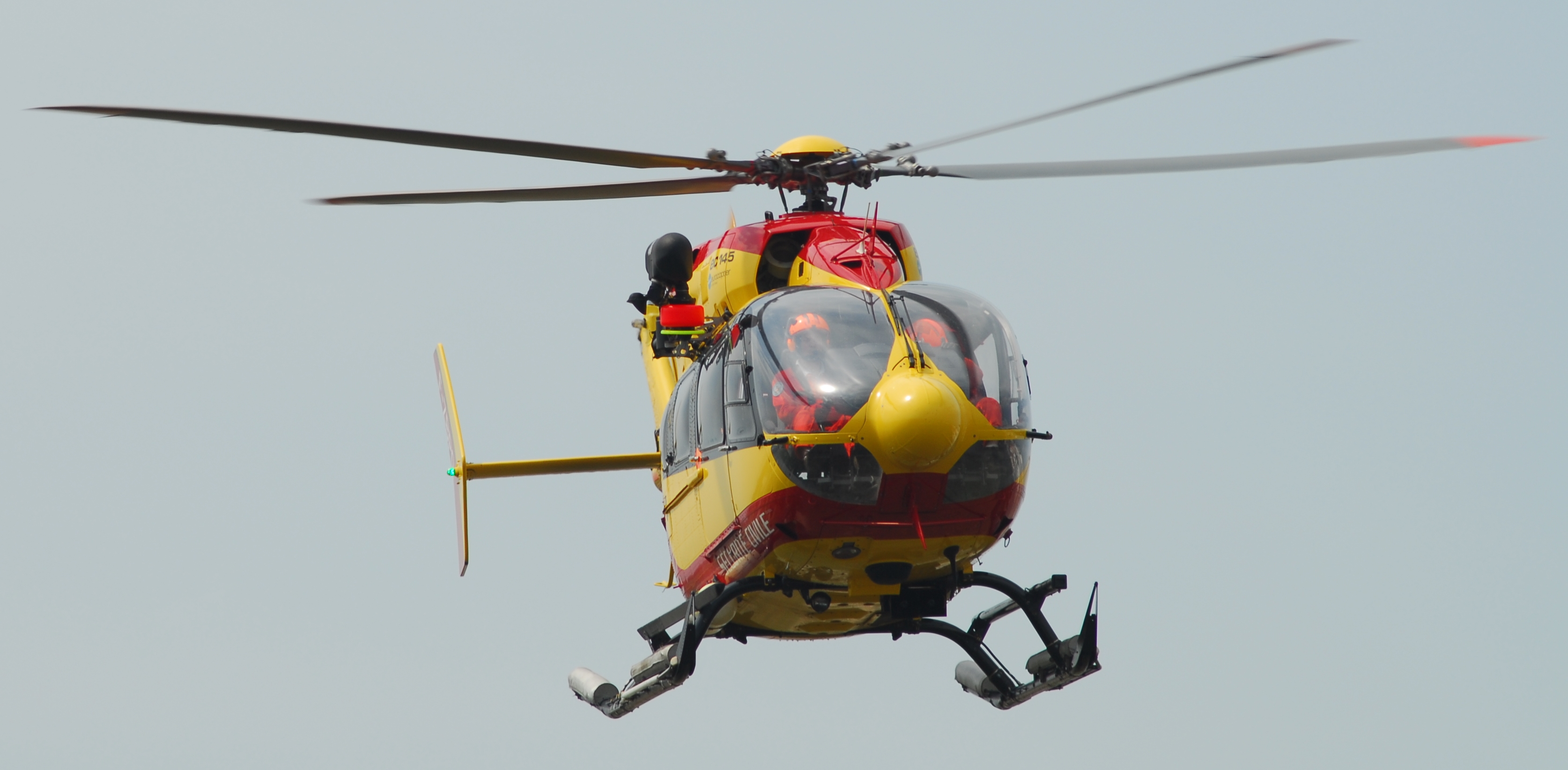 Eurocopter EC145 over Marignane Airport, Marseille, France, 2007